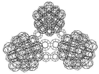 Ikozi-ikozaéderek gyűrűje